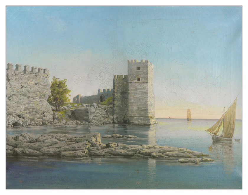 Fortress